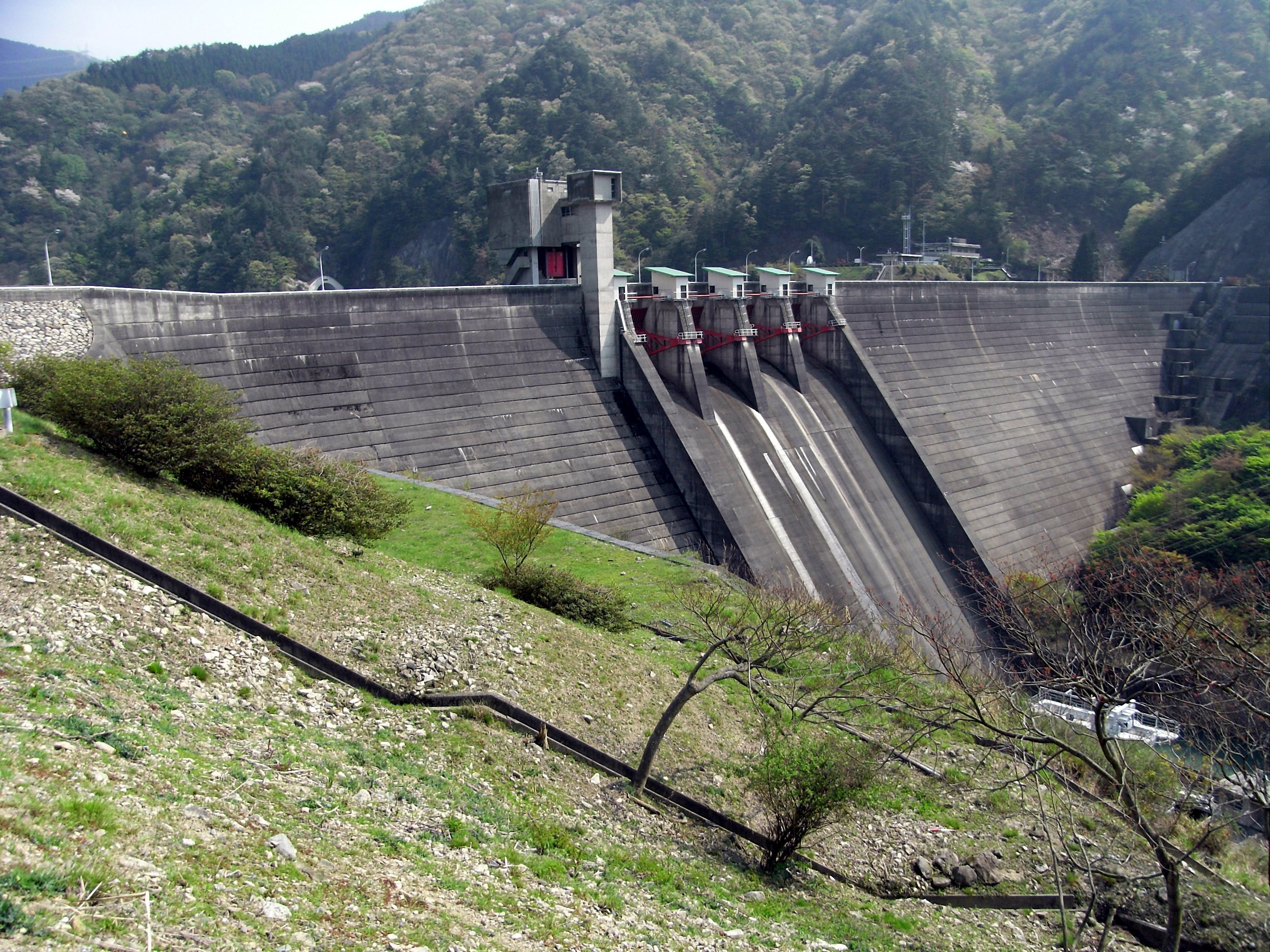 Dam